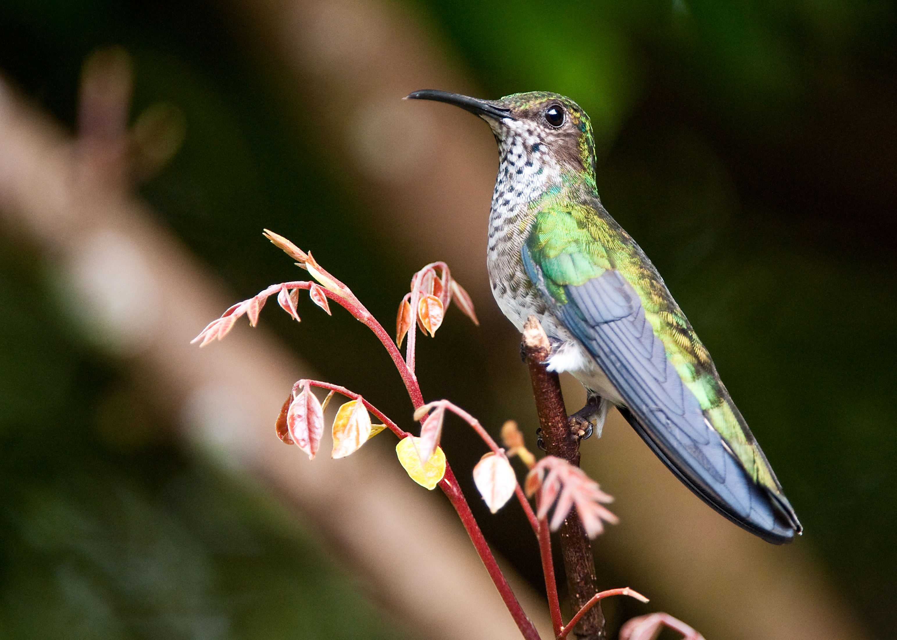 Florisuga mellivora female Rancho Naturalista, Costa Rica